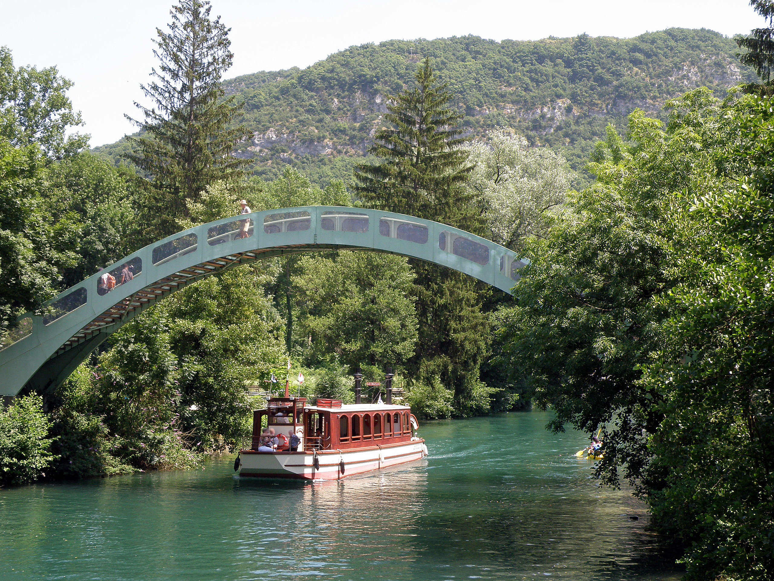 Chanaz, comm. de la Savoie (région Rhône-Alpes, France). Aspect du bourg-centre : la passerelle sur le canal de Savières.